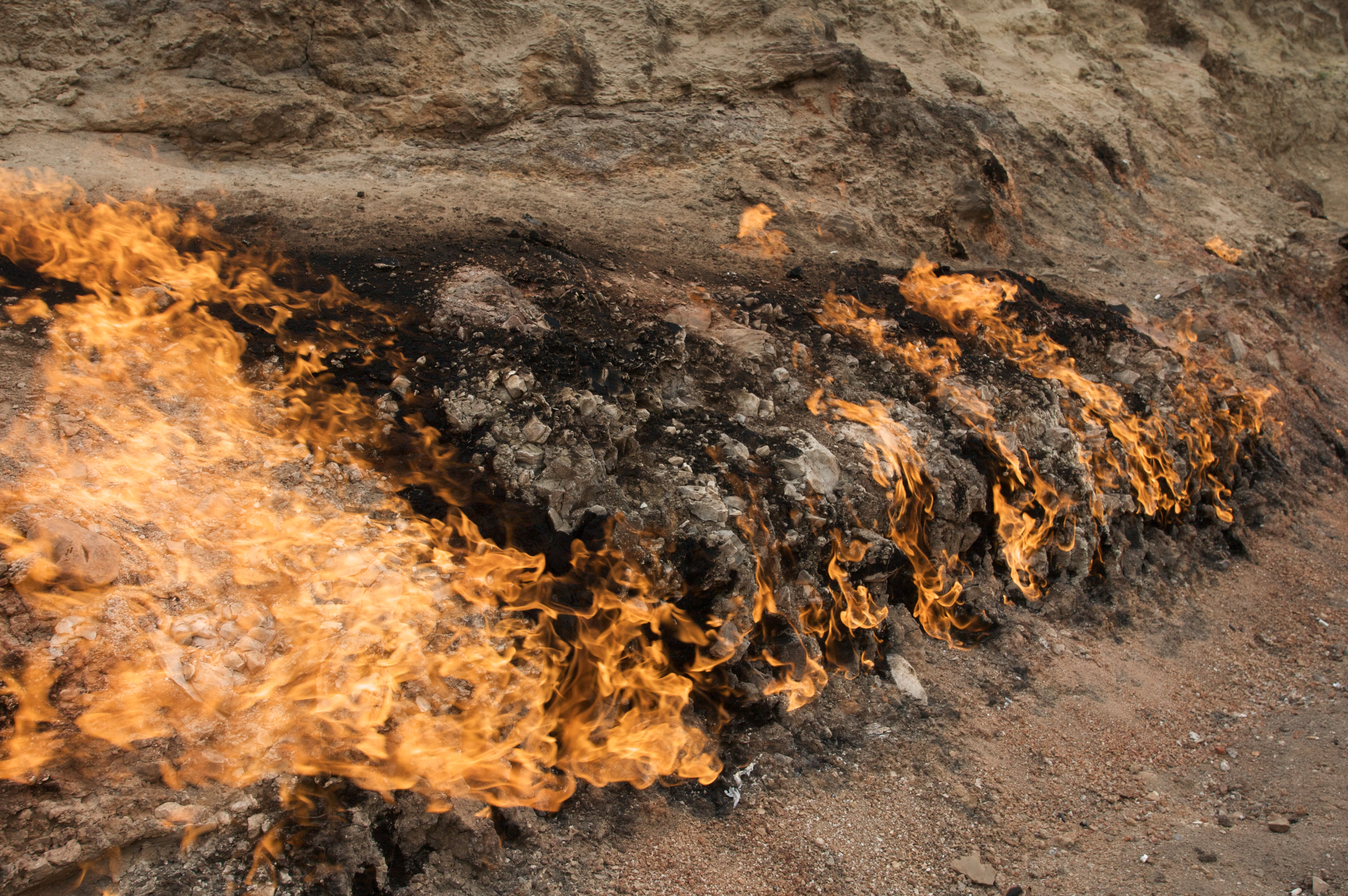 Yanar Dag - Flaming Hillside